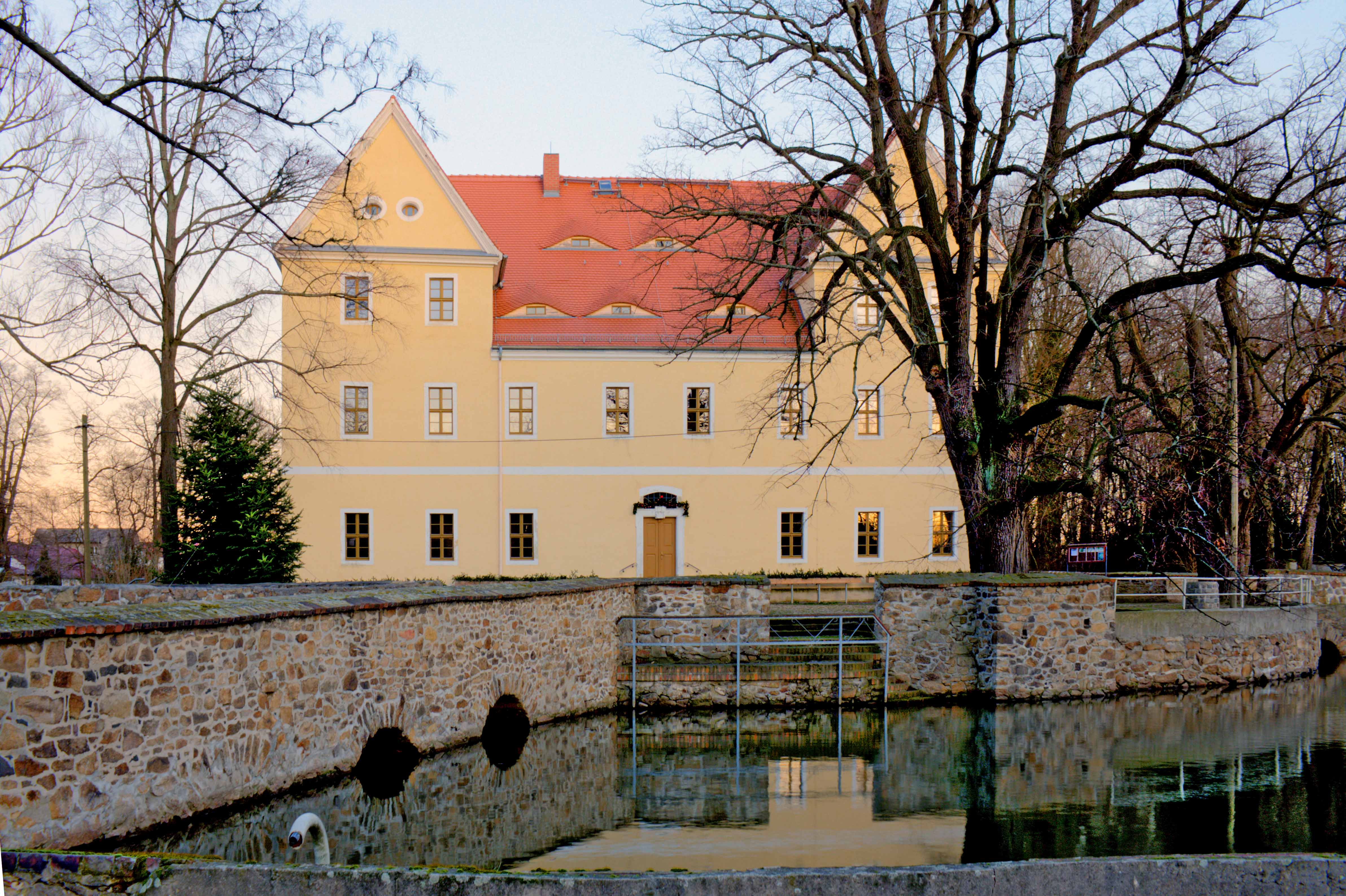 Herrenhaus Röcknitz, An der Wasserburg 1; 3 in Thallwitz OT Röcknitz